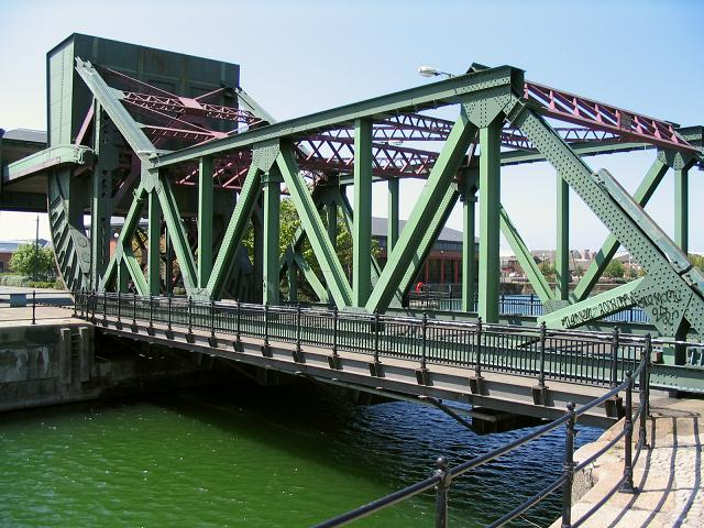 Egerton Bridge (2)